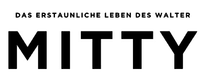 Logo von Das erstaunliche Leben des Walter Mitty